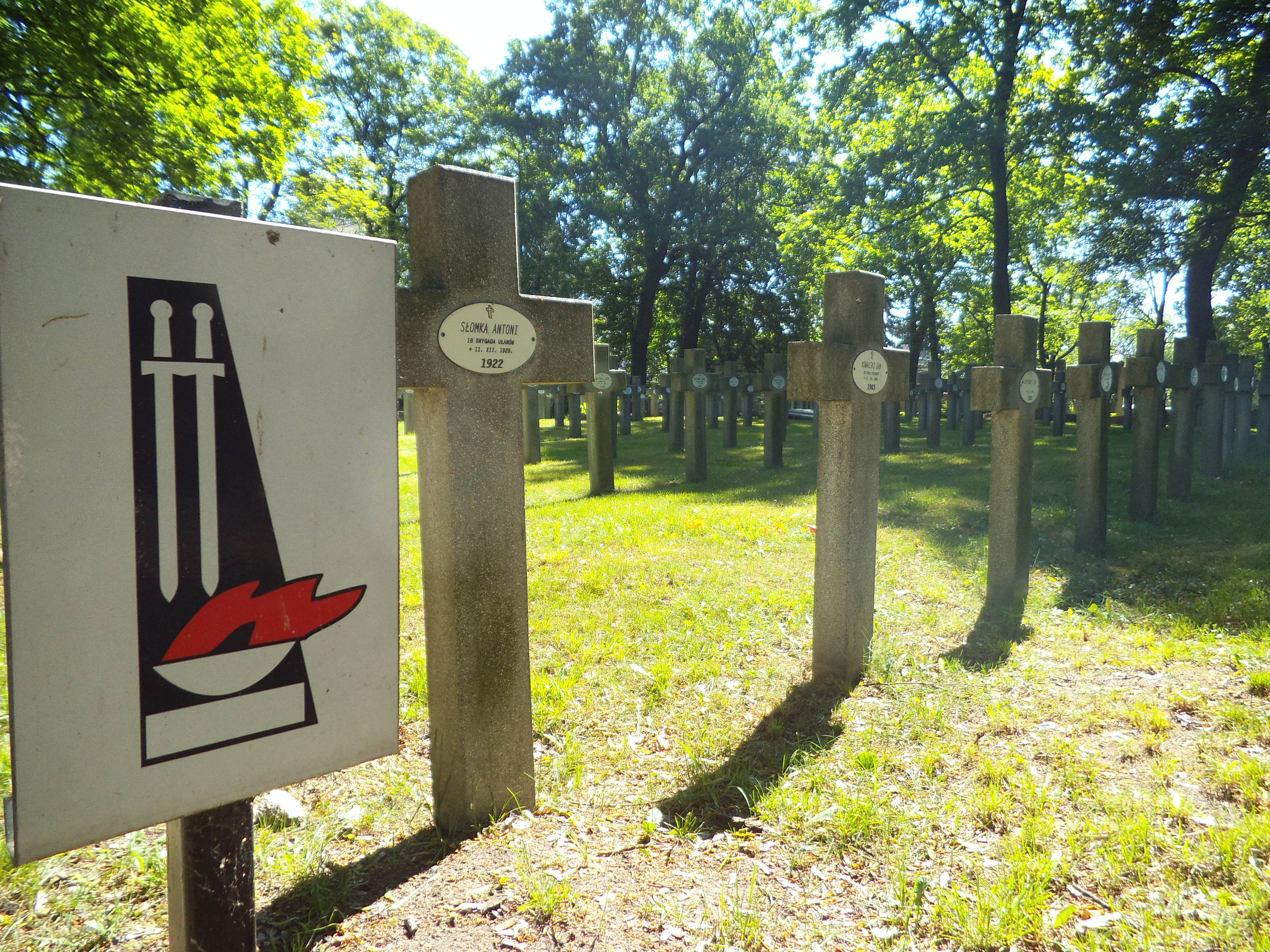 Cmentarz garnizonowy w Toruniu